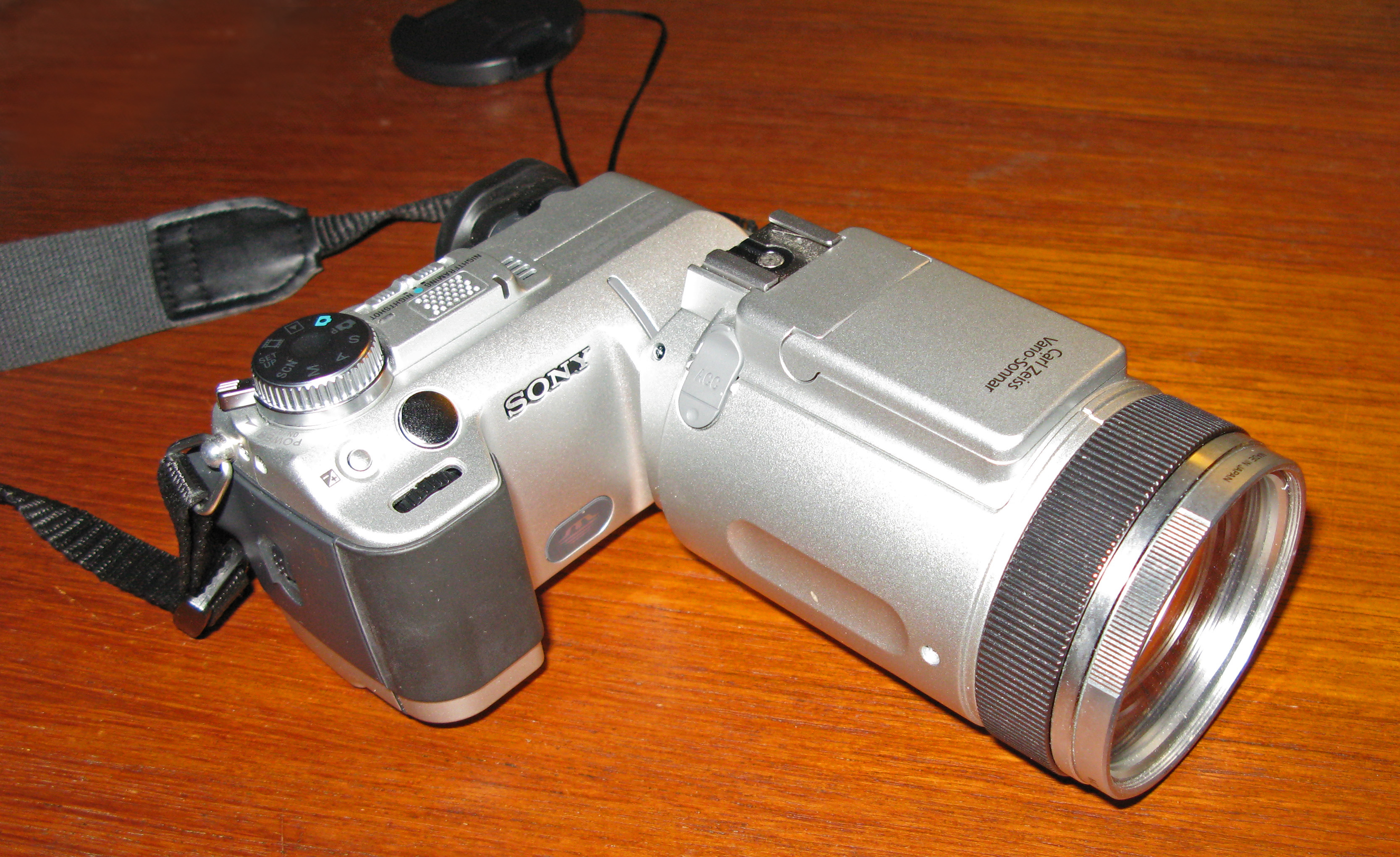 Sujet:Bridge-Fotoapparat SONY DSC-F717 Source:Eege Foto vum User:Cornischong Lizenz